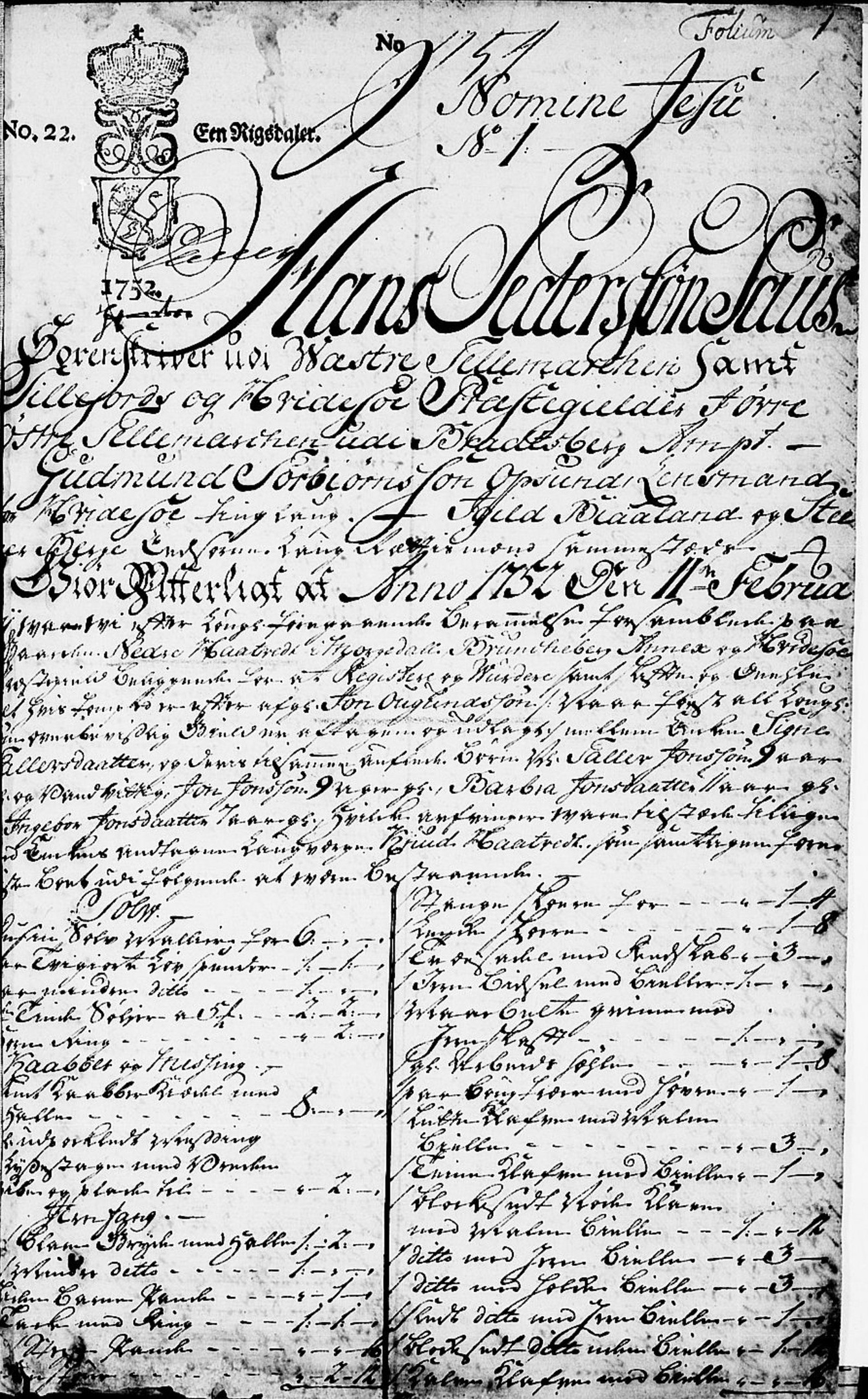 Øvre Telemarken vestfjelske sorenskriveri, skifteprotokoll 1752-1759, sorenskriver Hans Pederssøn Paus